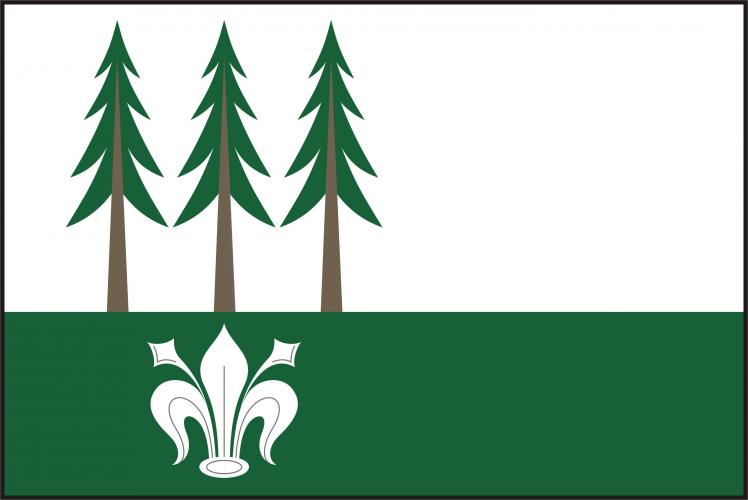 vlajka, Sulkovec, okres Žďár nad Sázavou